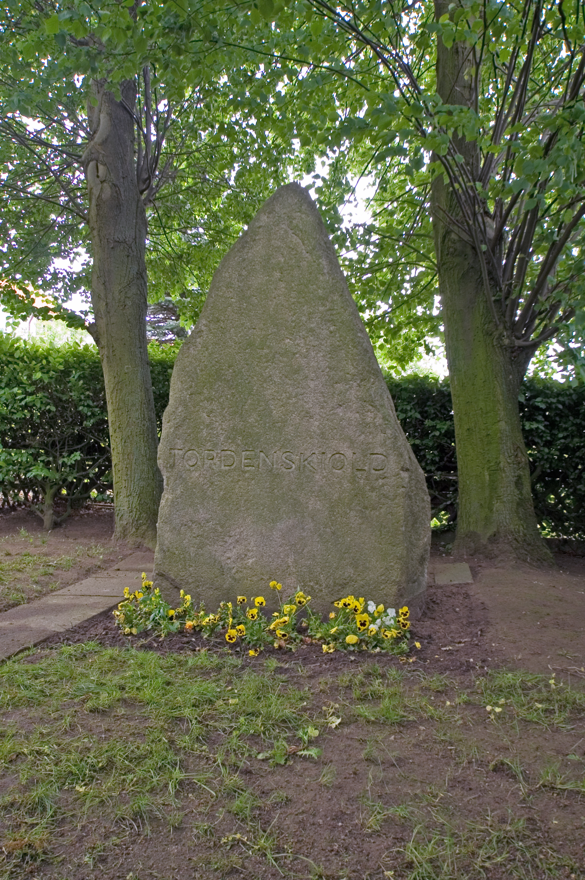 Tordenskiold, Gleidingen, Germany